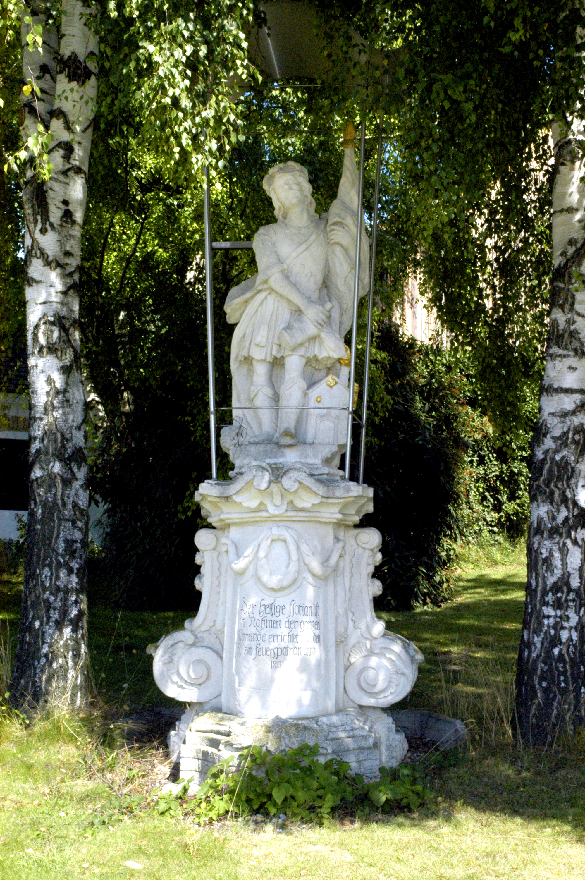 Staue des hl. Florian in Fahndorf, Gemeinde Ziersdorf